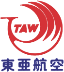 東亜航空のロゴ